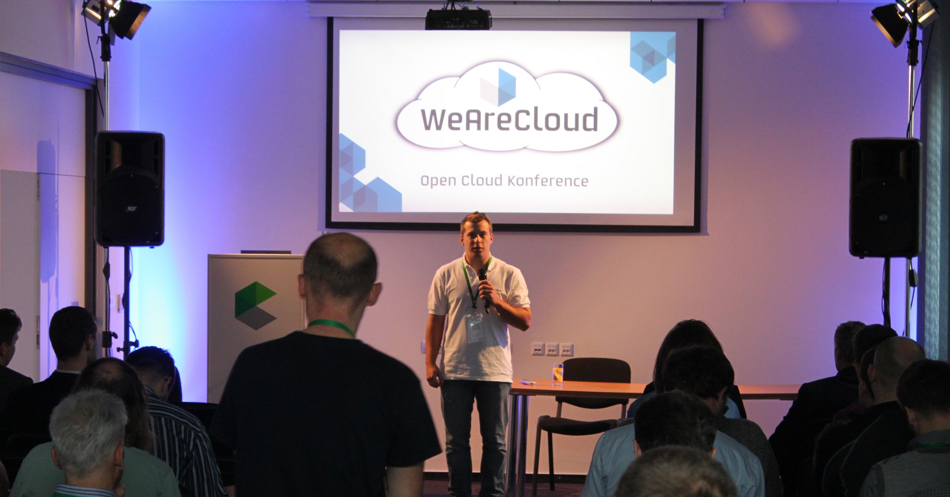 Konference WeAreCloud TCP